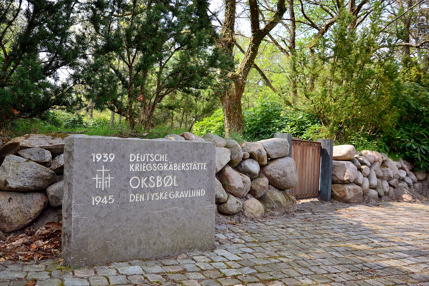 Oksbøl, Dänemark, Datum/Uhrzeit: 19.05.2013 13:03:01